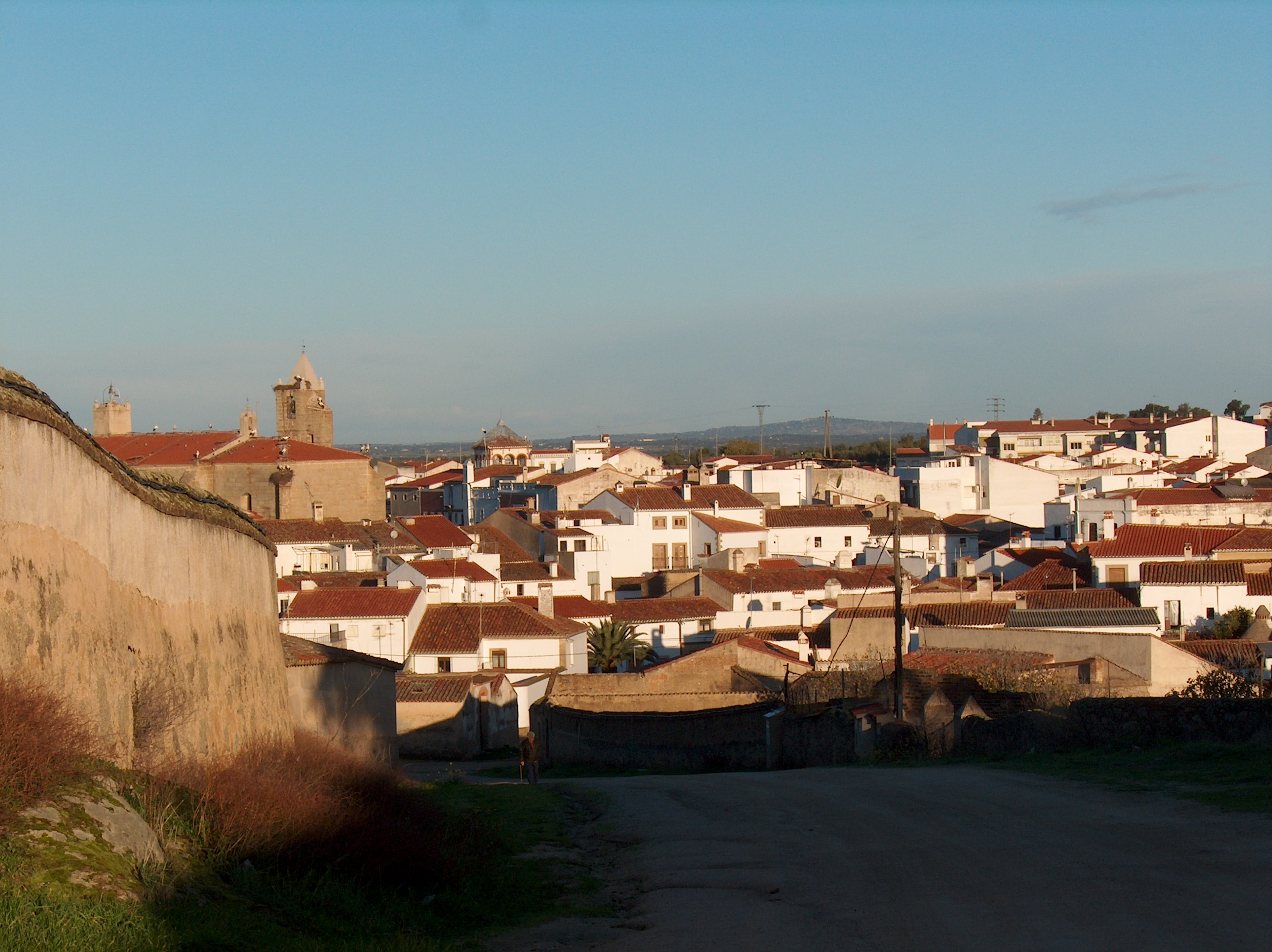 El acceso a Malpartida desde camino del Cuerno